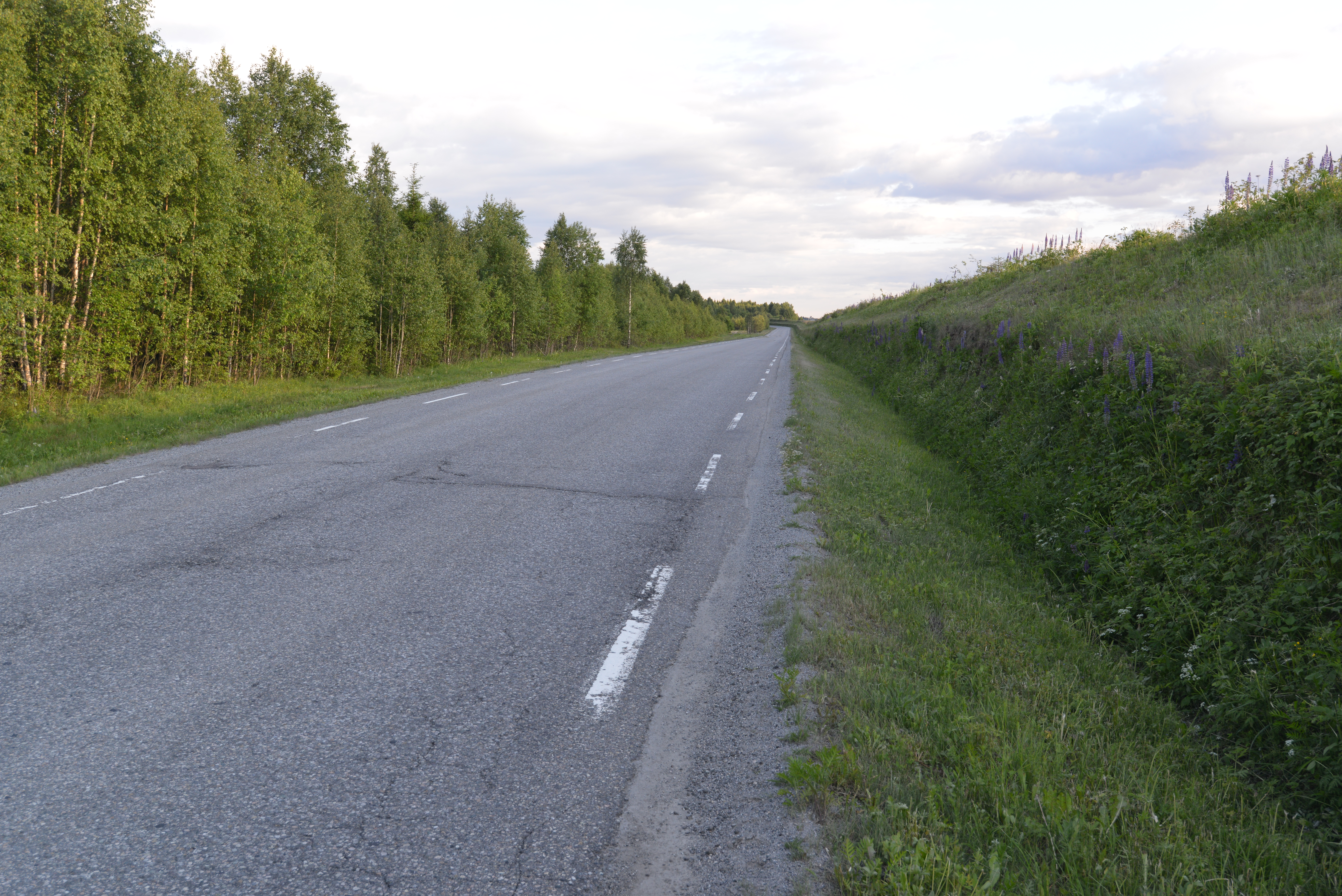 Gardermobanen går parallelt med E16 ved Fursmotunnelen